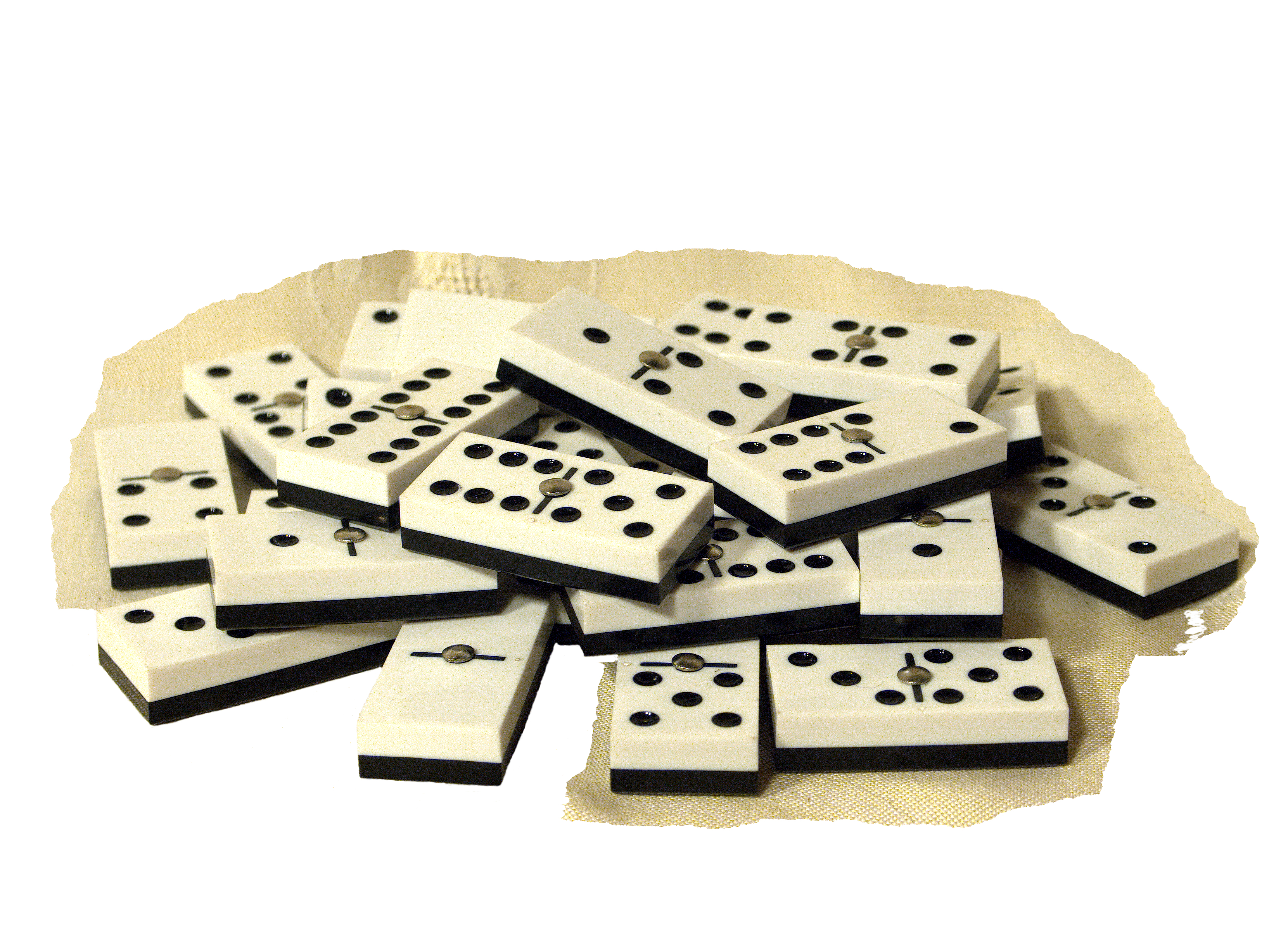 Dominosteine